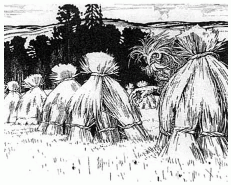 Полевик. Иллюстрация к разделу "Славянская мифология" в книге "Всеобщая мифология"